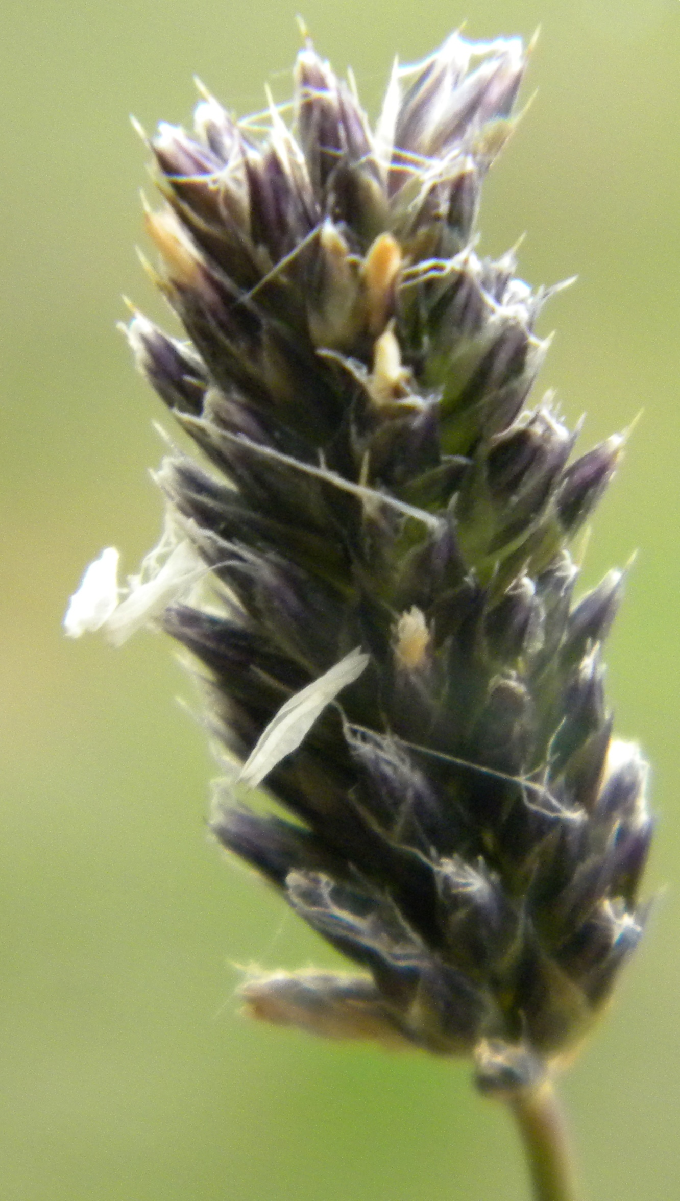 Sesleria caerulea (Chaux France)